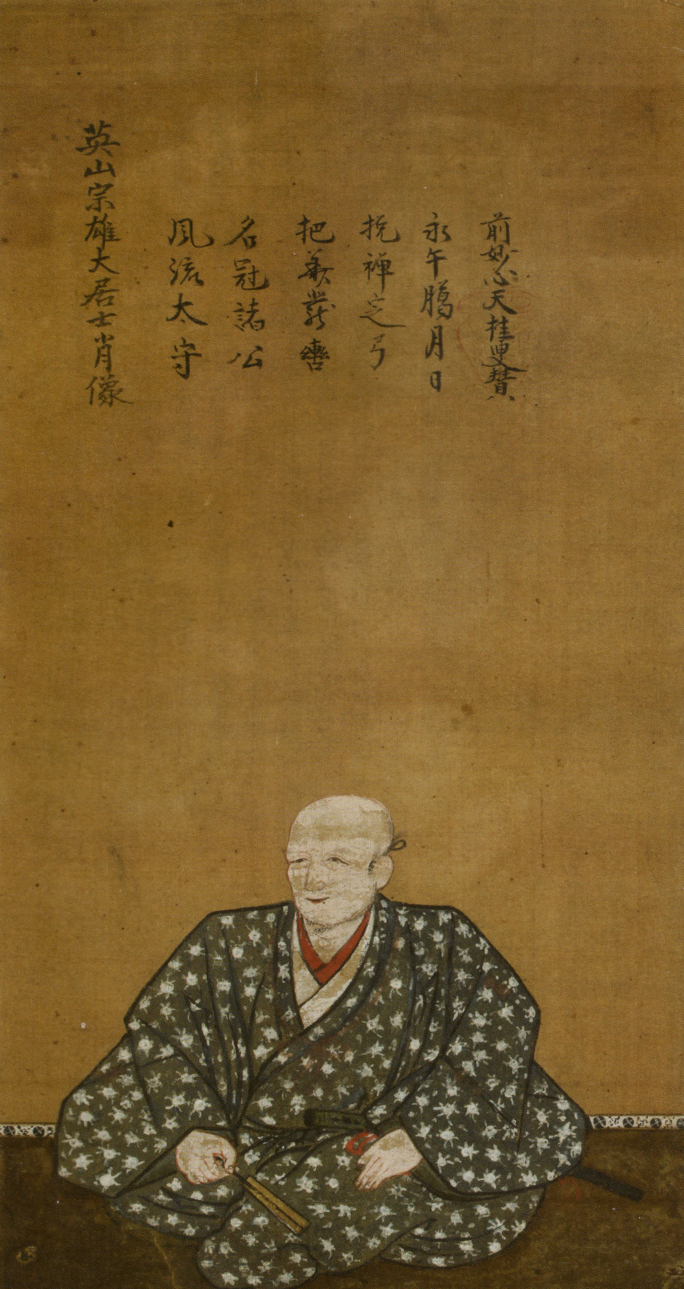 木曾義在の肖像。